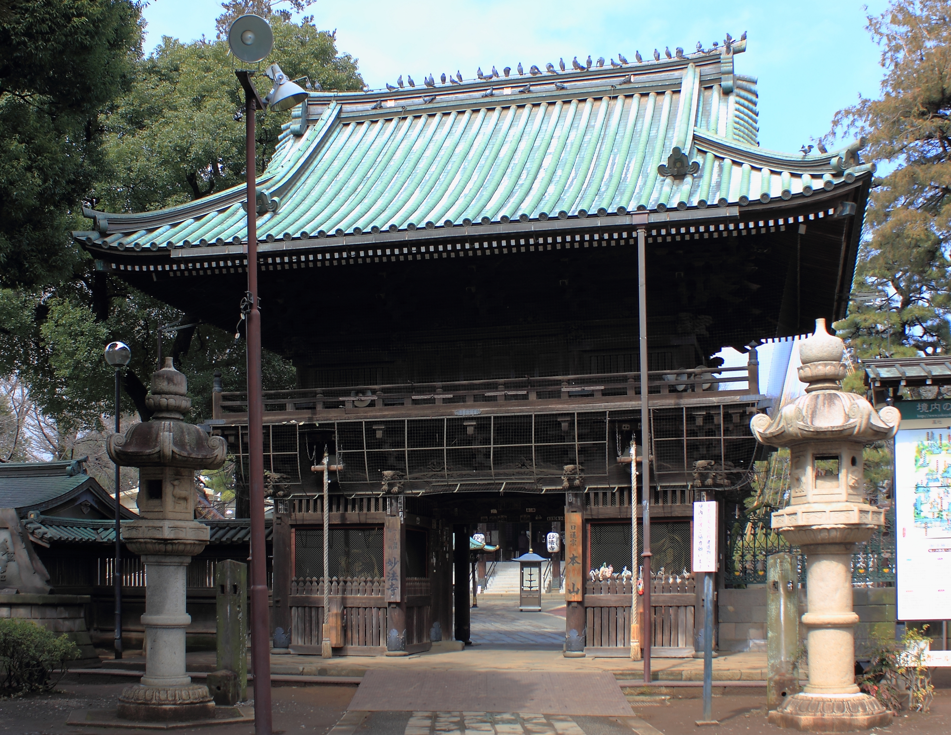 妙法寺仁王門（東京都指定有形文化財・東京都杉並区）